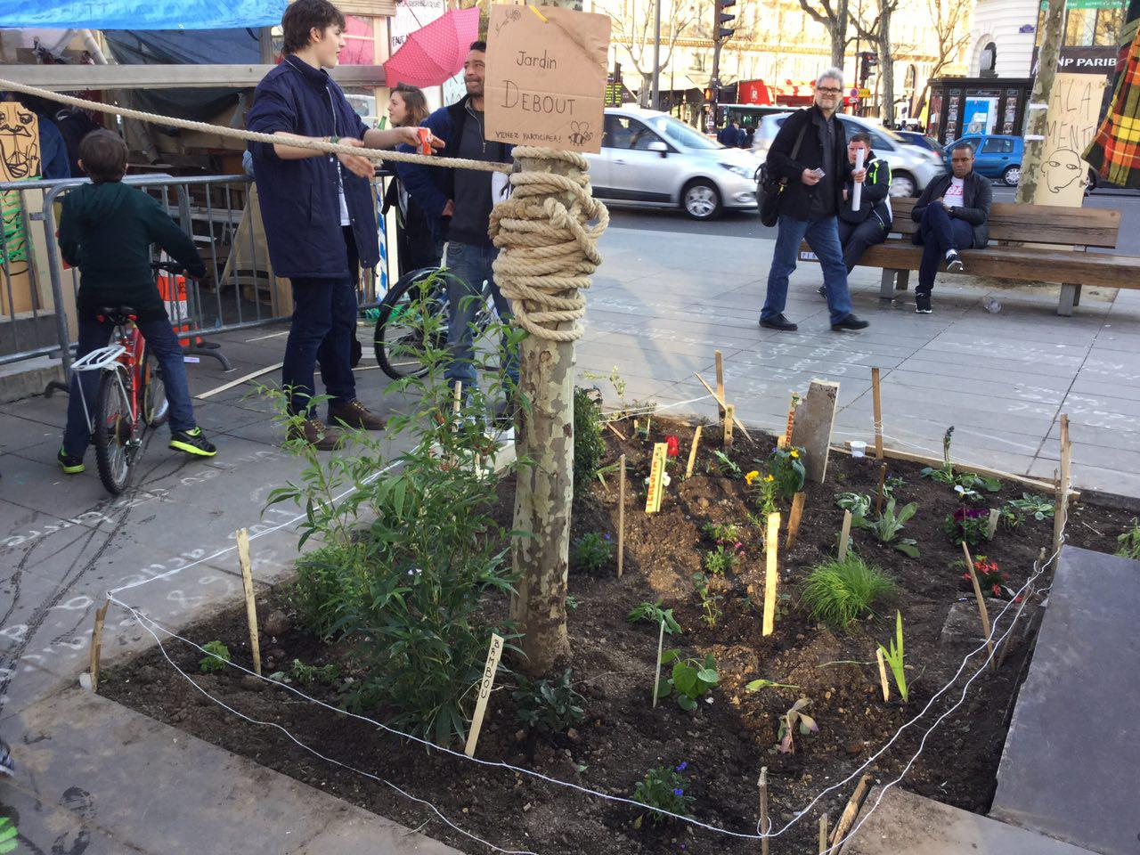 Jardin éphémère